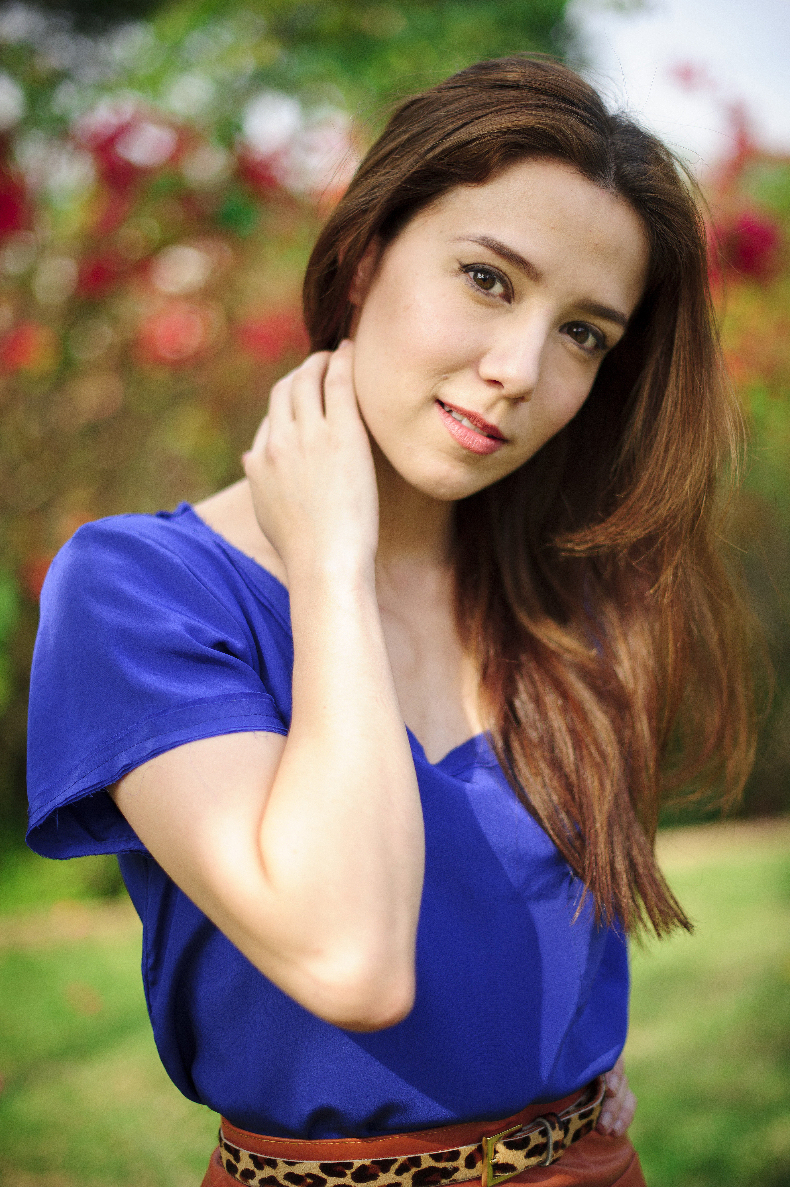 Atriz e Cantora